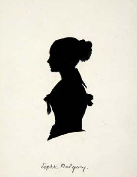 Софье Яковлевне Веригина, ур. графиня Булгари (ок. 1819—1898)